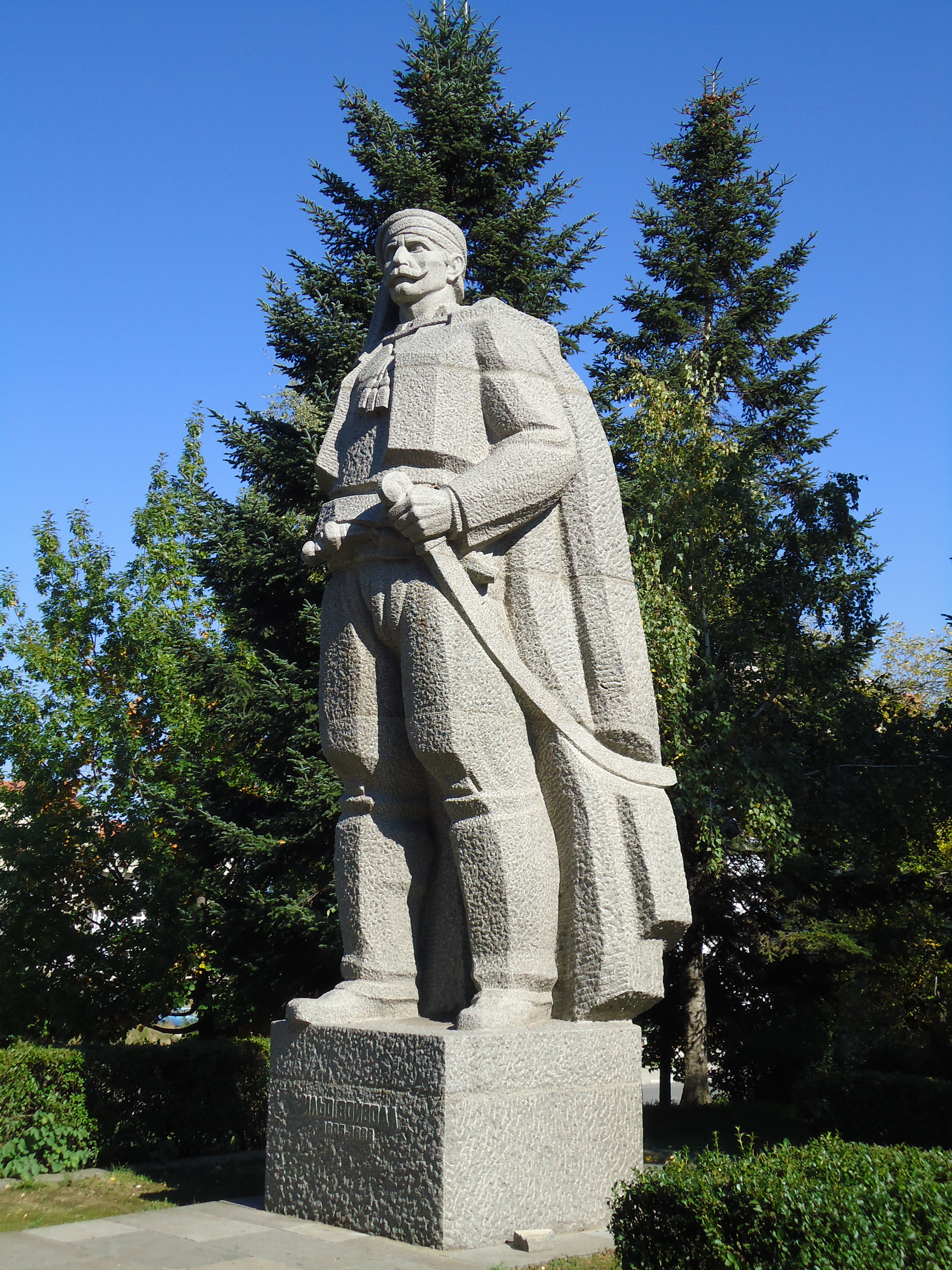 Паметникът на Ильо войвода в гр.Кюстендил